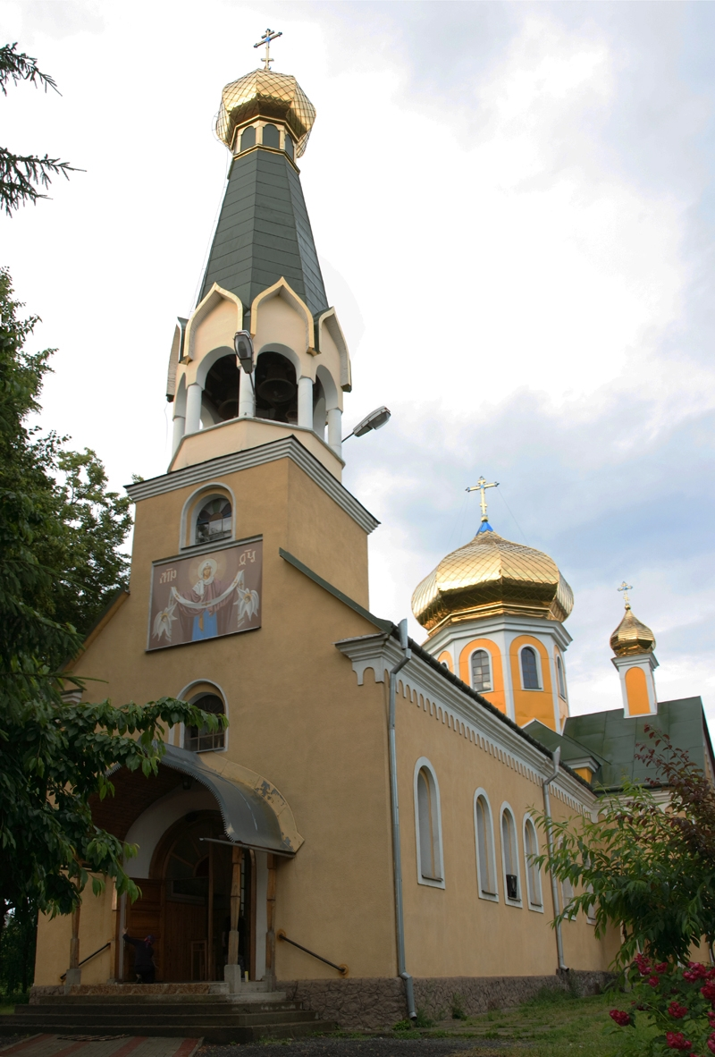 Благовещенская церковь в Хусте, УПЦ-МП